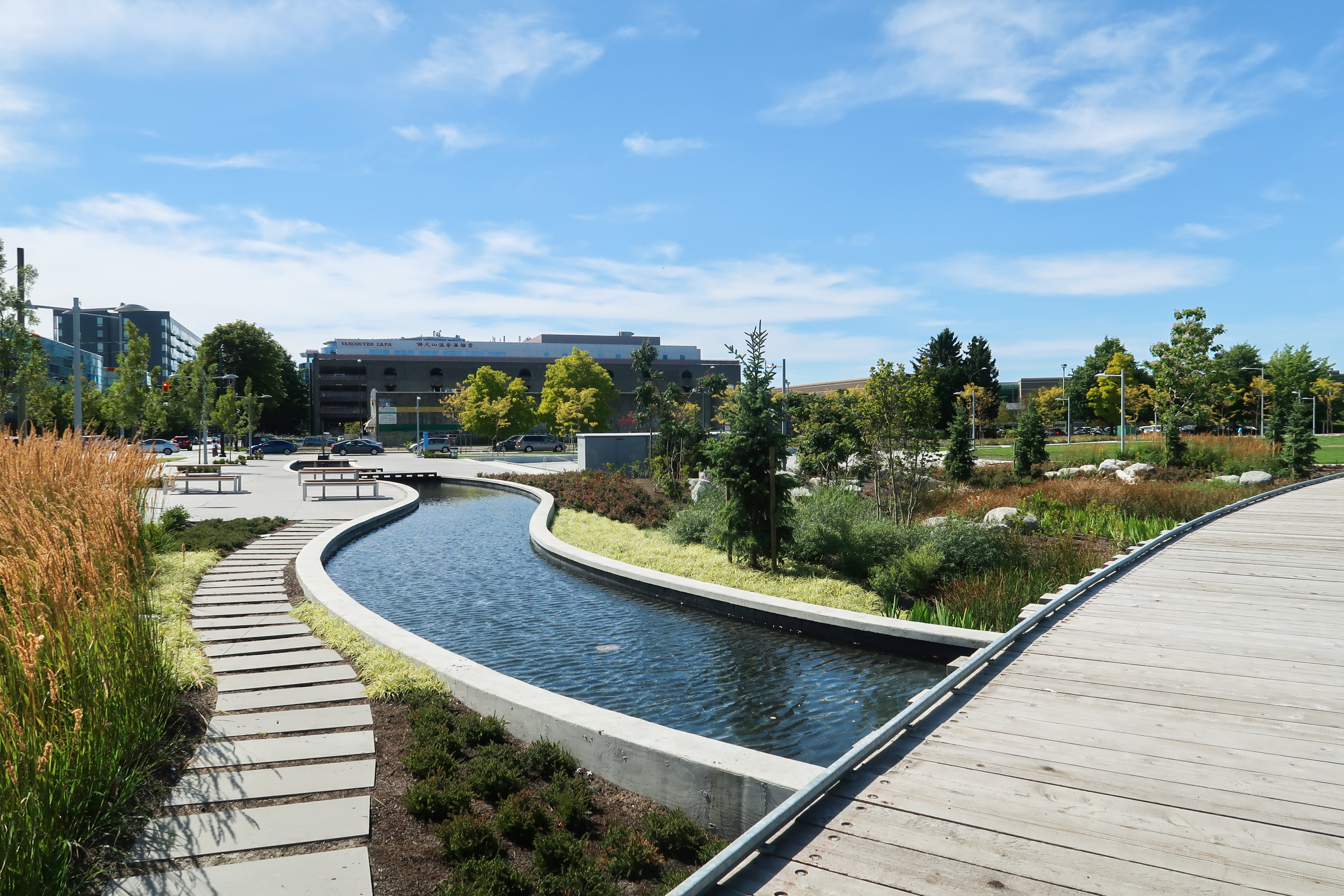 Aberdeen Park, Richmond, BC